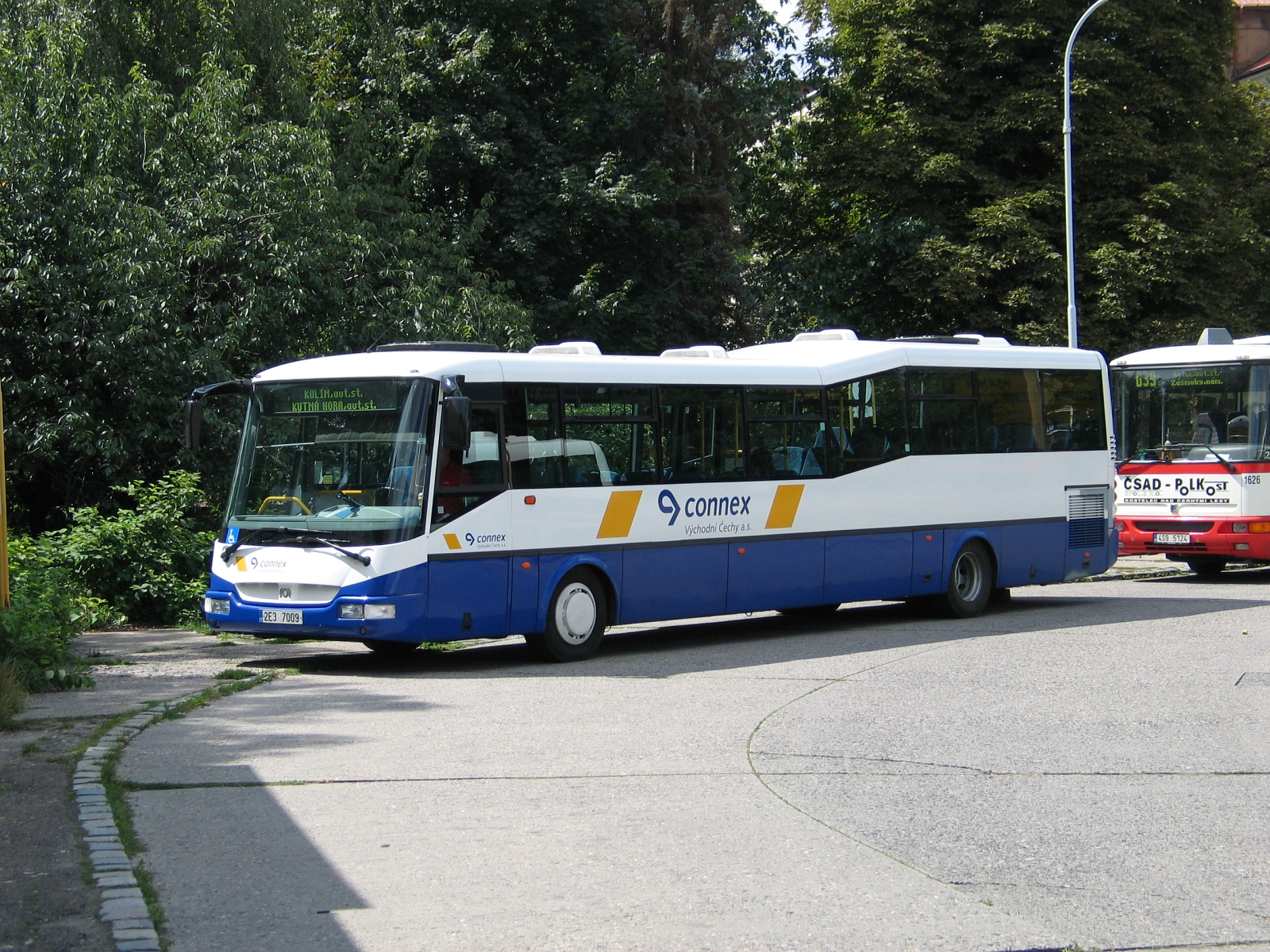 SOR CN 12, Kolín